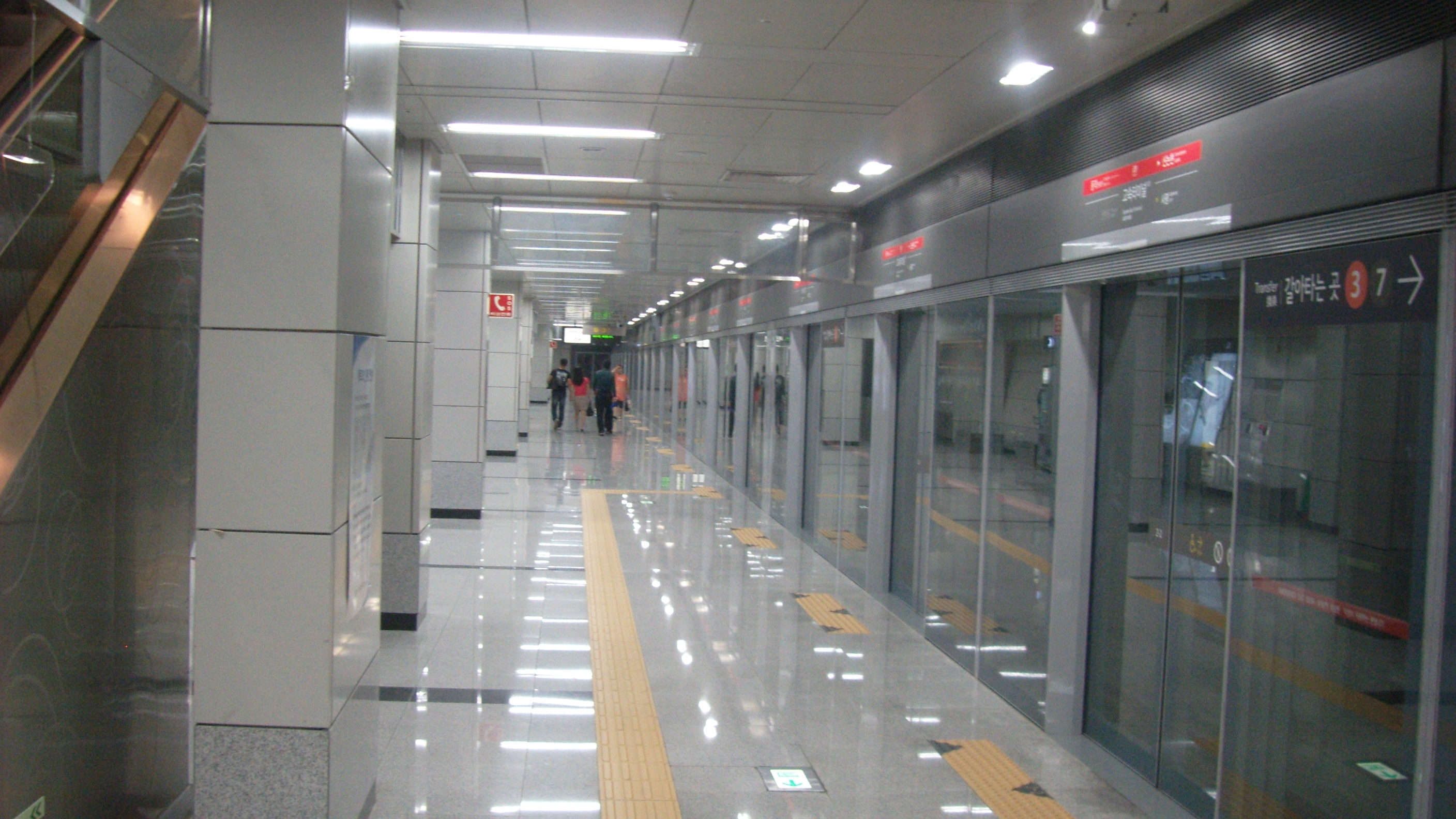 고속터미널역 9호선 승강장